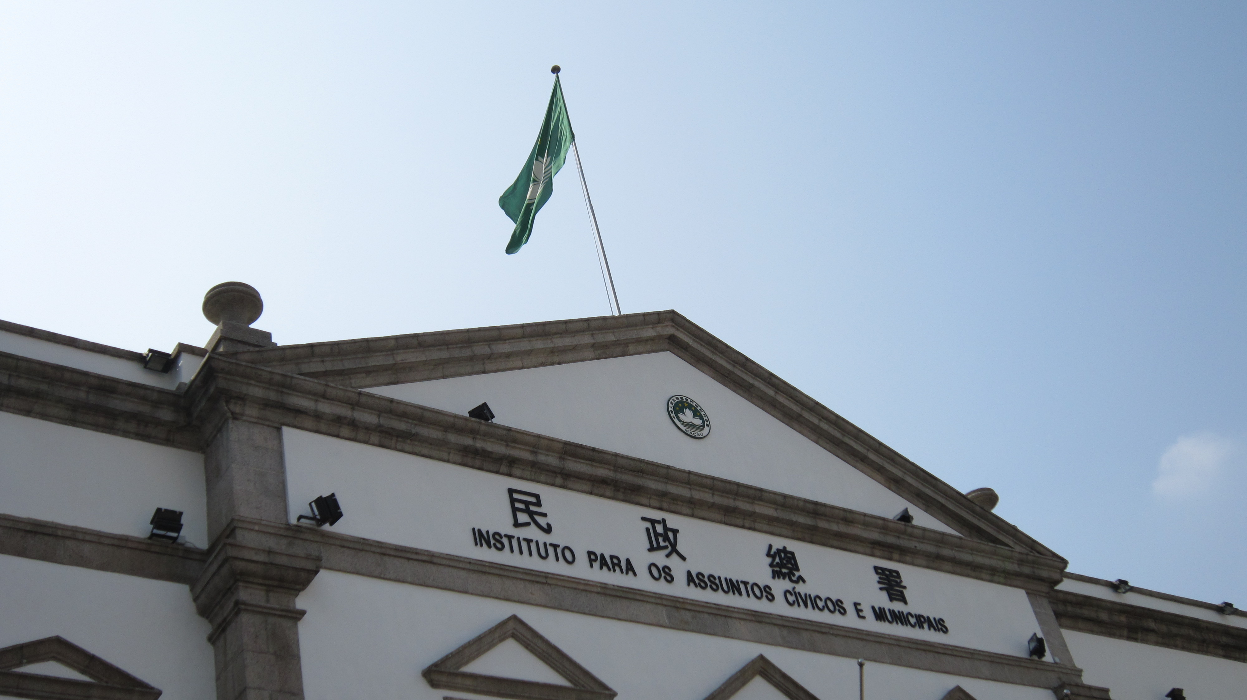 Politicamente correto do Edifício do Instituto para os Assuntos Cívicos e Municipais